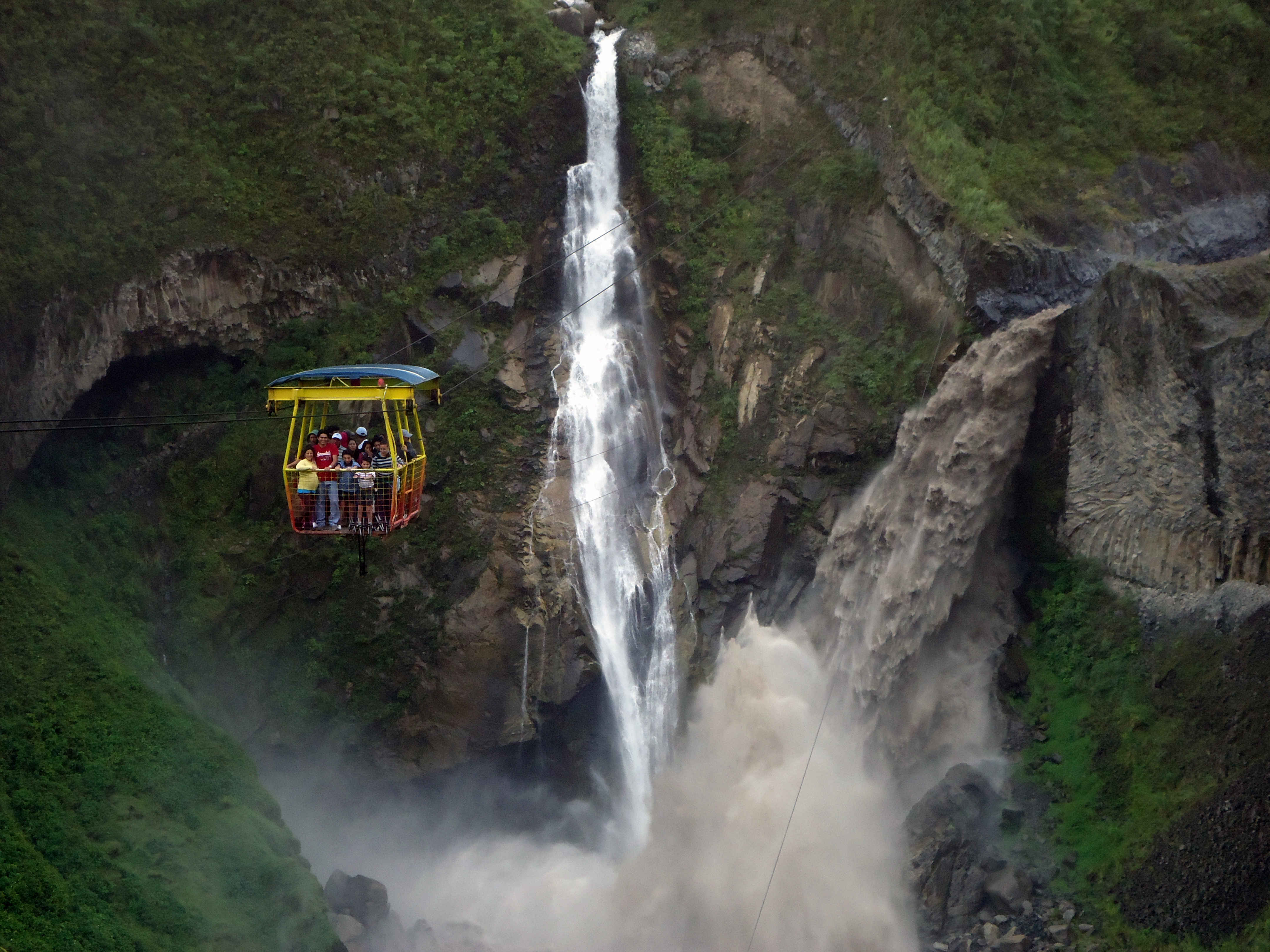 Tarabita en la cascada de Agoyán (Baños de Agua Santa)